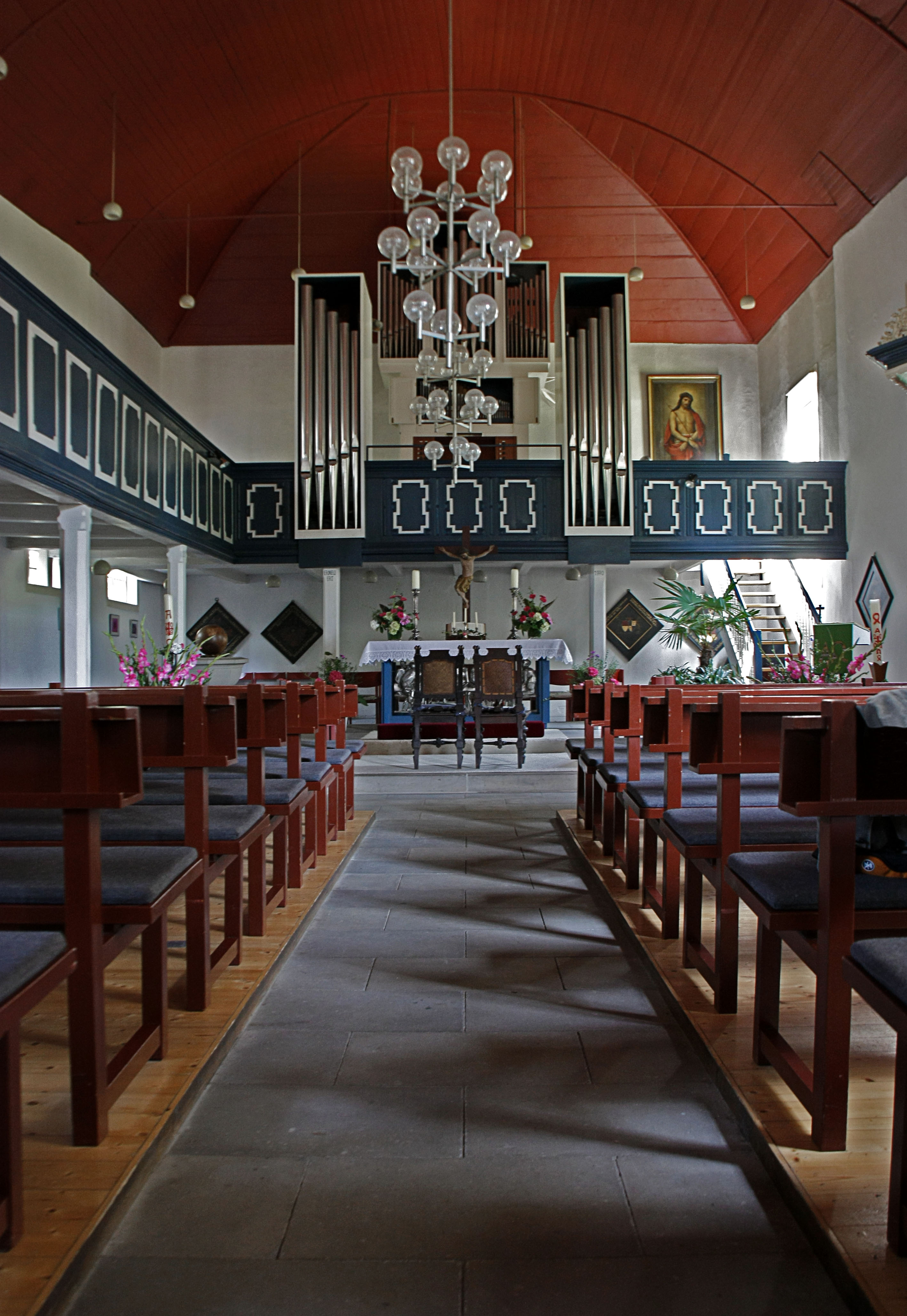 Innenraum mit Orgel der Johanniskirche in Arenshorst